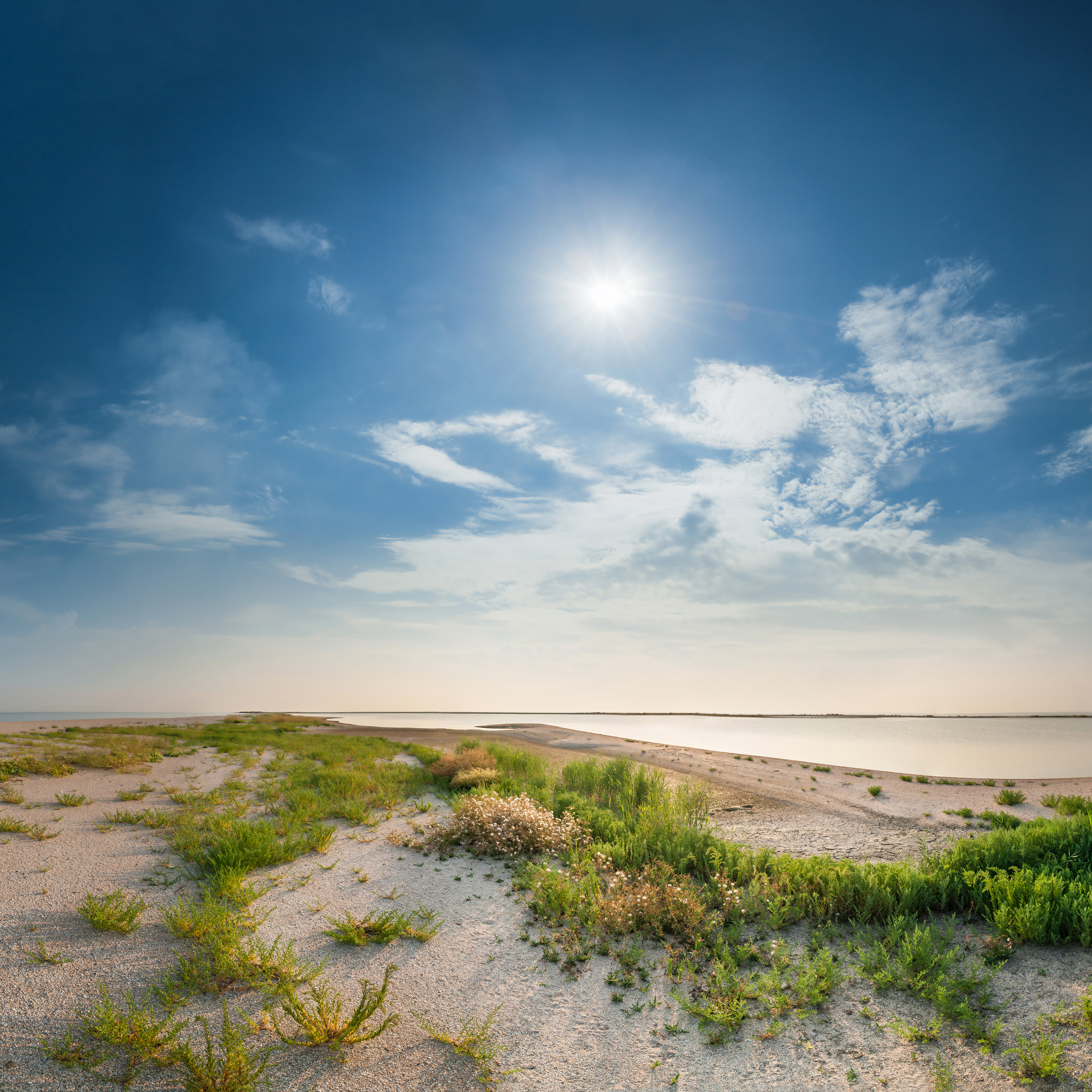 Меотида, Національний природний парк